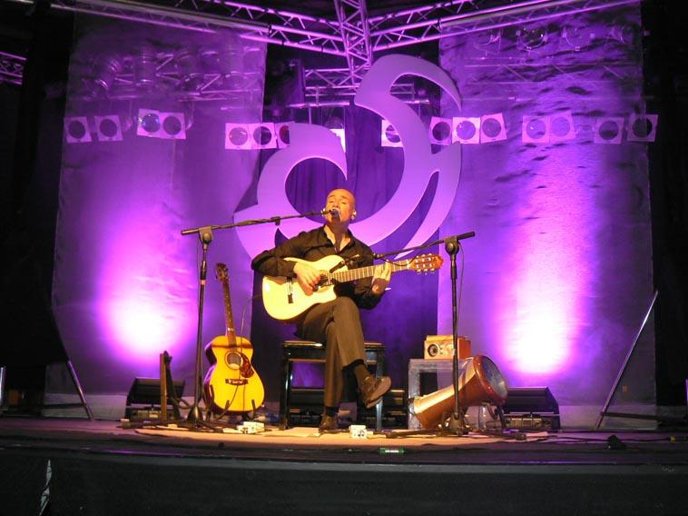 Mario Venuti durante il "Sulu Tour" a Roma